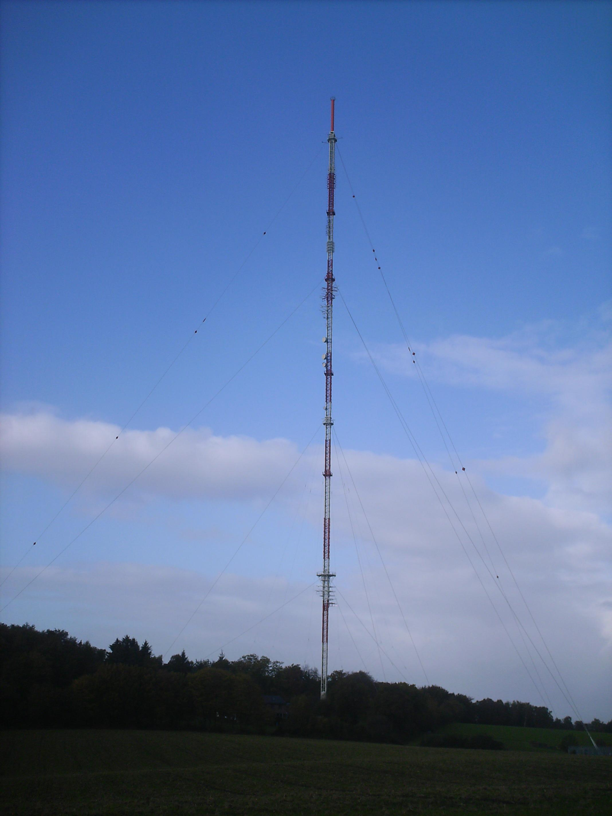 Sendemast Langenberg-Hordt